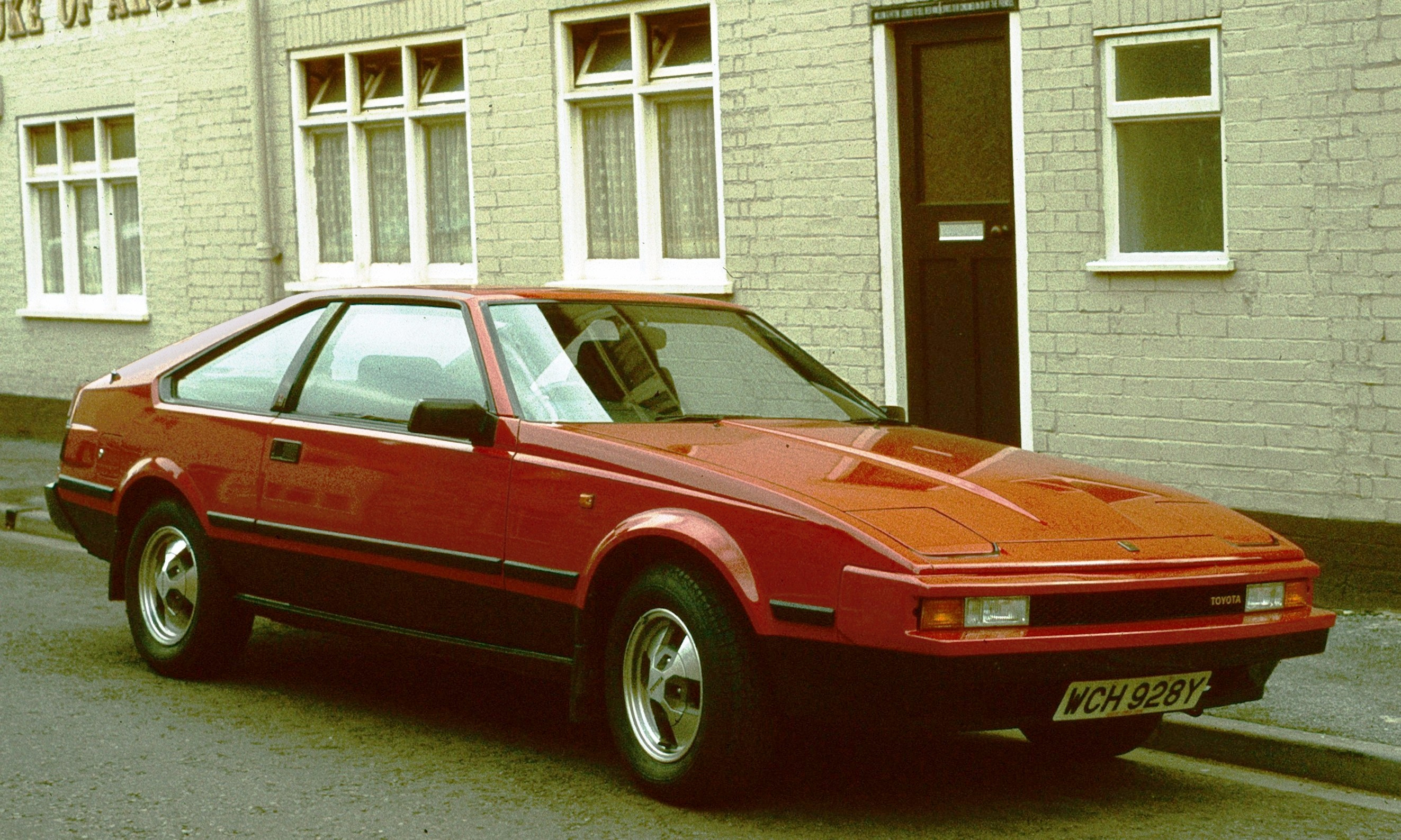 Toyota Supra